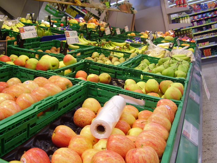 Supermarket